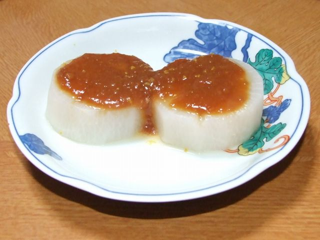 Furofuki-Daikon 風呂吹き大根